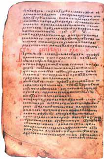 КИЧЕВСКИ ОКТОИХ. Пергаментен македонски ракопис од средината на XIII в. Пронајден е во 1926 од Тома Смилјаниќ - Брадина во црквата Св. Атанасиј во с. Премка (Кичевско), Македонија